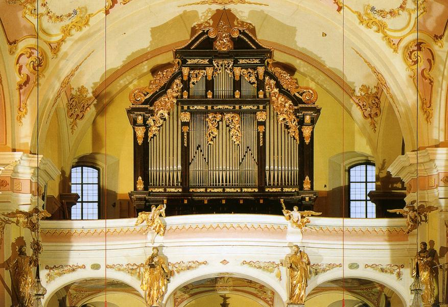 Egedacher-Orgel von St. Veit am Vogau